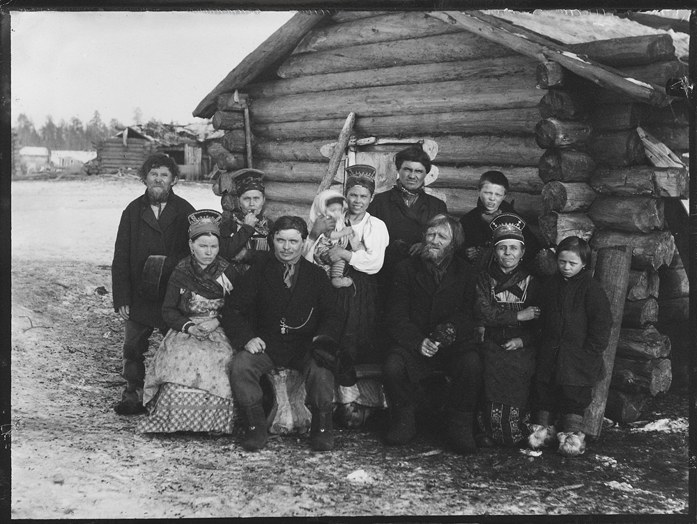 Wessel, Ellisif Rannveig Gruppeportrett av skoltefamilie i friluft. NMFF.002136